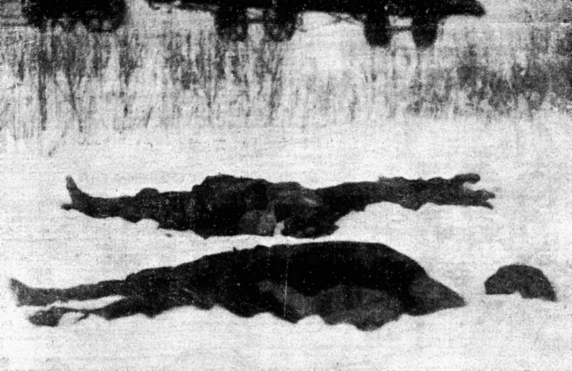 Punaste langenud pärast Tapa lahingut.